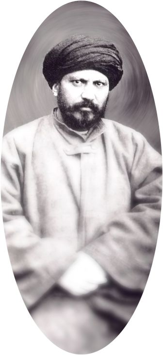 Al-Afghani, photo prise ici